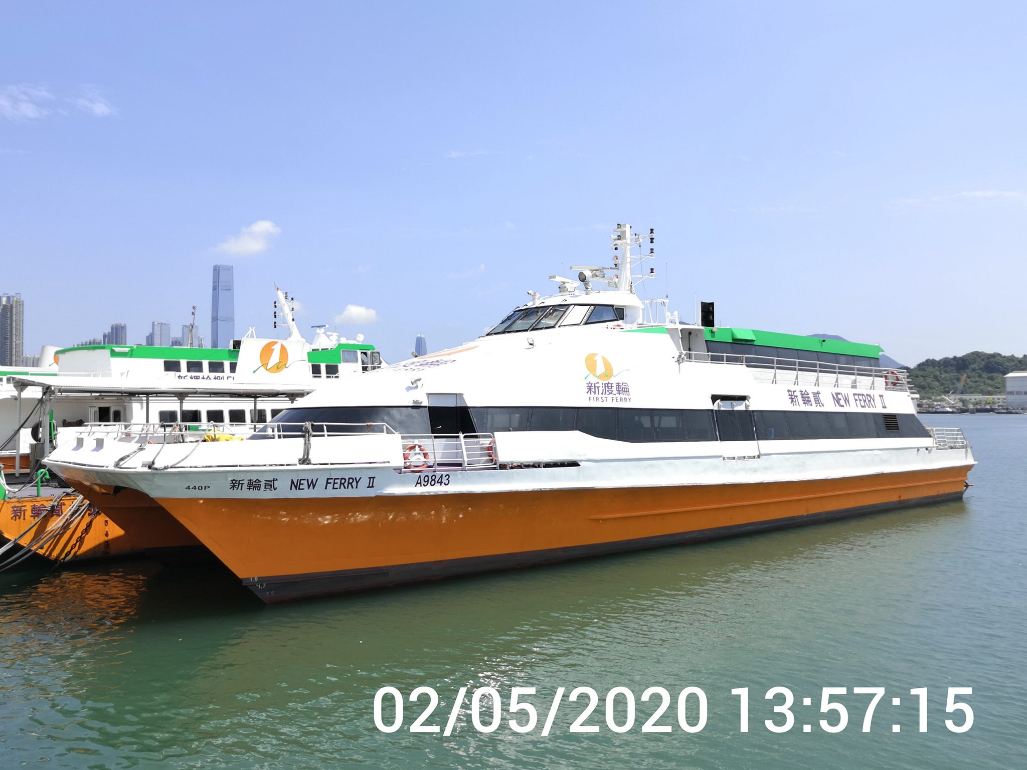 星期六，已吃完午餐後下午去到西九龍長沙灣興華街西船塢此拍攝噴新渡輪的新加坡FlyingCat豪華雙體快速船「新輪貳」（前香港油麻地小輪船港輪貳）相片，埋面就是一艘從珠江客運往順德線的已退役澳洲澳大利亞Austal 40m雙體快速船「順景」於上月29日過檔新渡輪，易名為「新輝拾捌」。